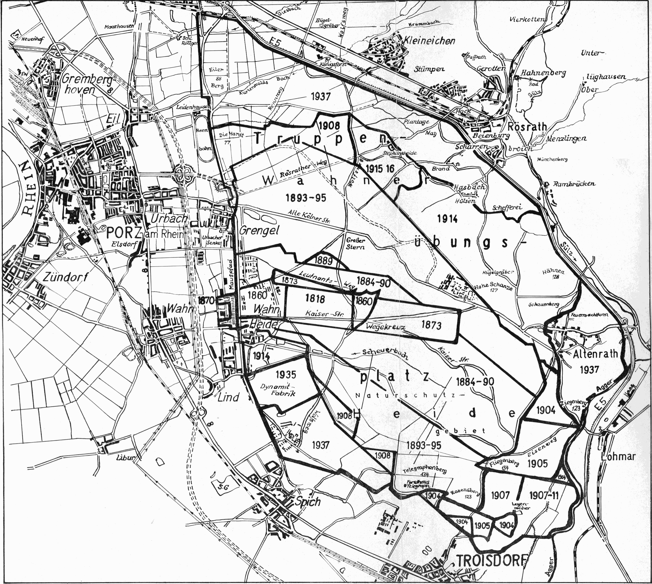 Karte mit historischer Entwicklung des Truppenübungsplatzes in Köln-Wahn